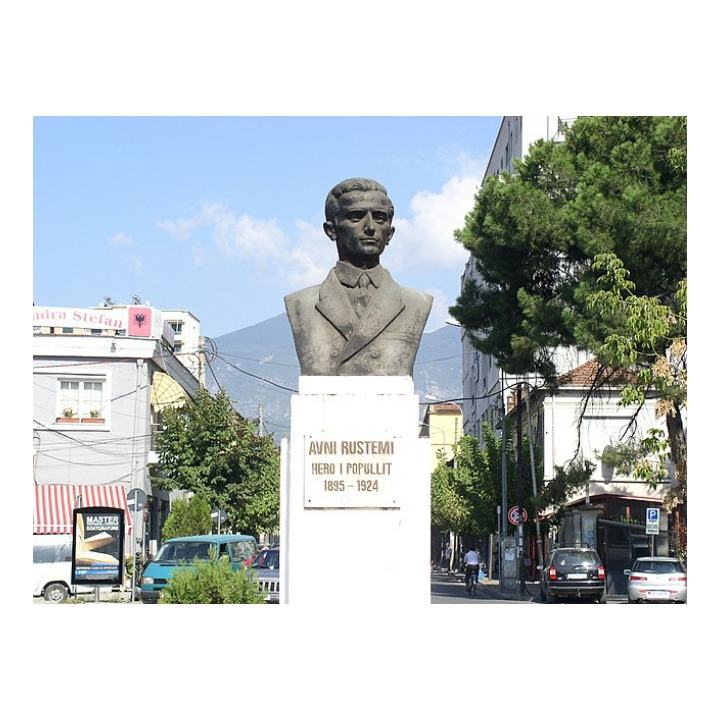 Avni Rüstemi Heykeli,Tiran